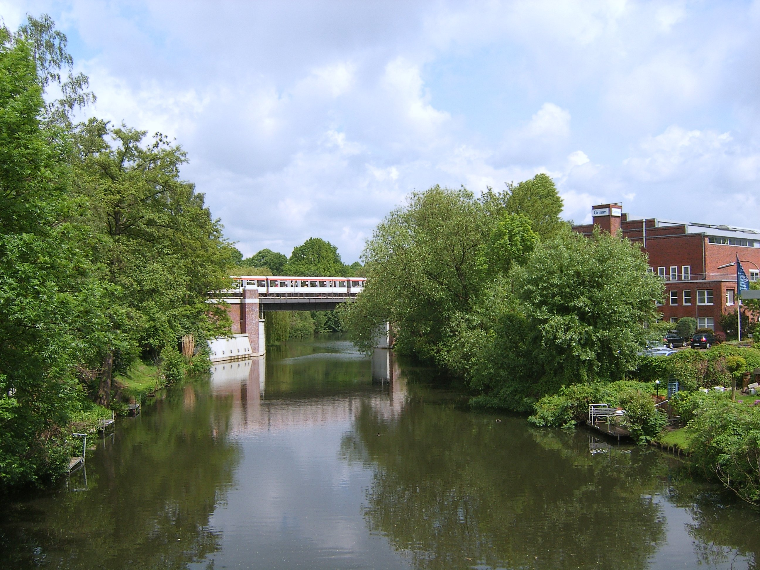 Hamburg, Winterhude, Goldbekkanal